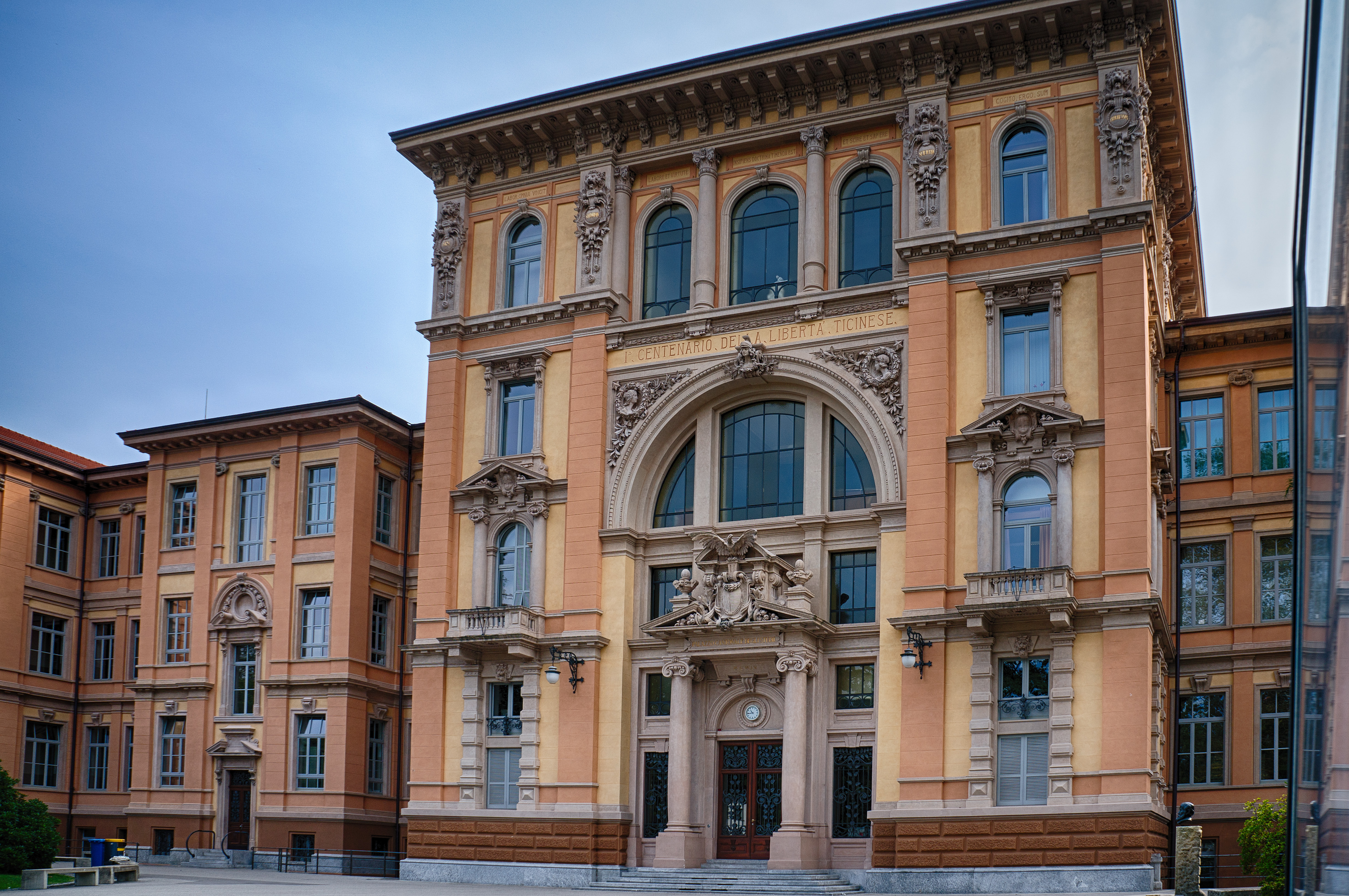 Palazzo Studi, entrata principale